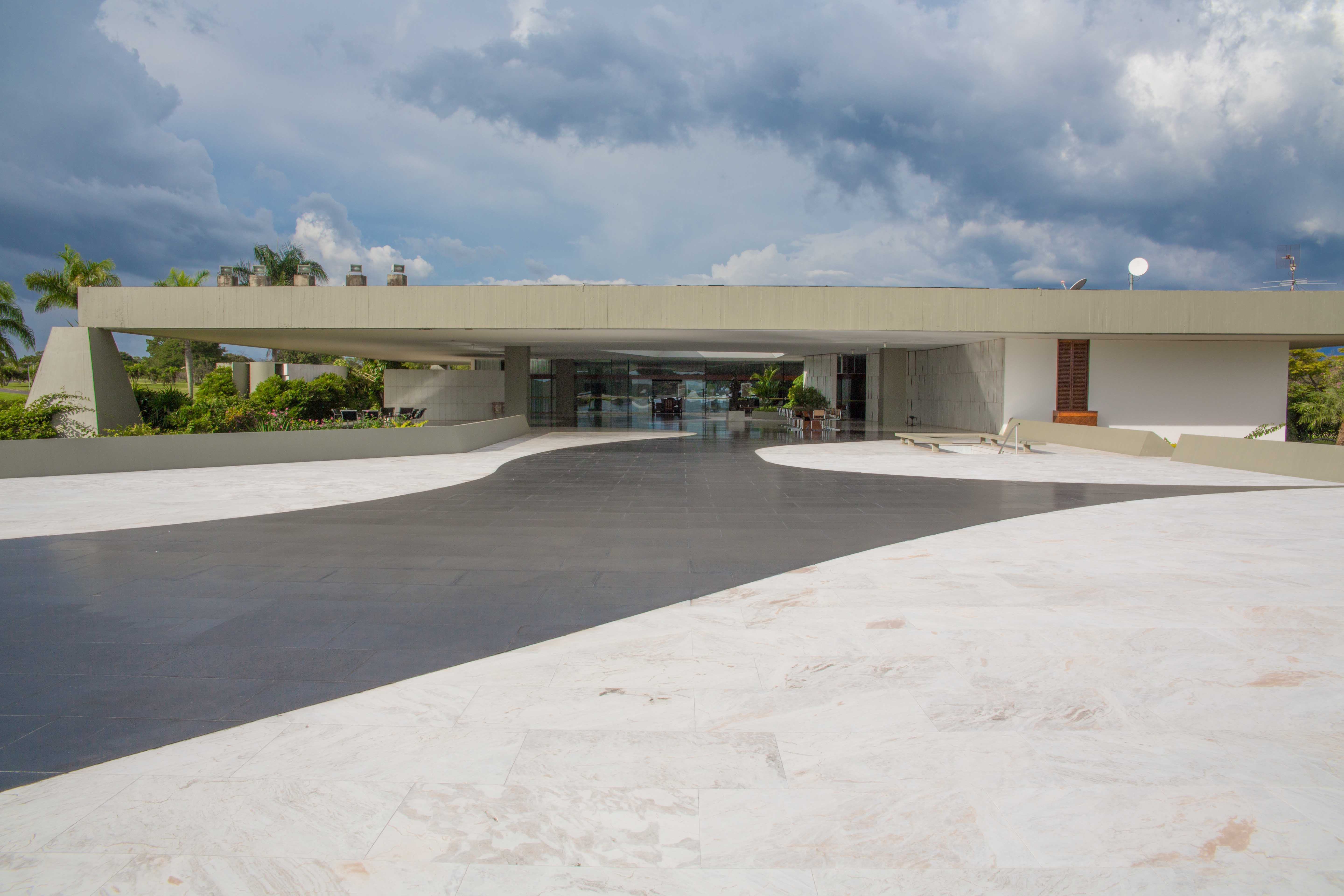 Palácio do Jaburu - Pátio externo e piscina Foto: Anderson Riedel